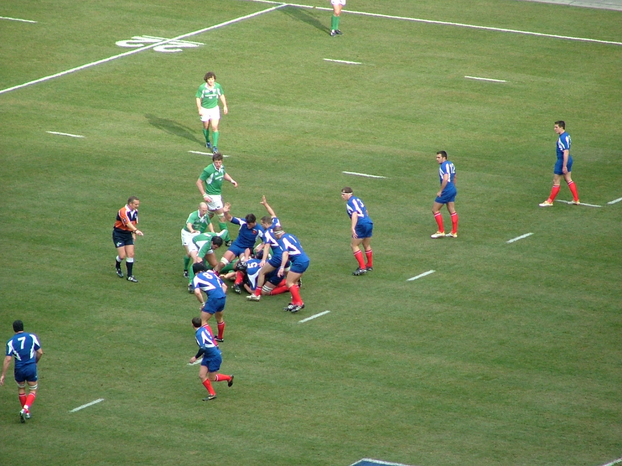 Le XV de France de rugby lors de France-Irlande du tournoi des six nations 2006 au Stade de France